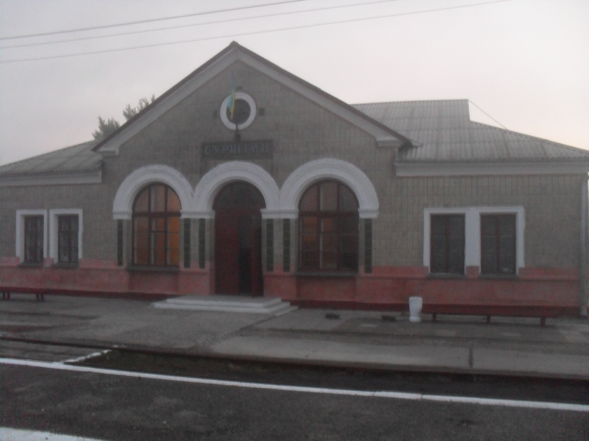 Залізнична станція "Бурштин"